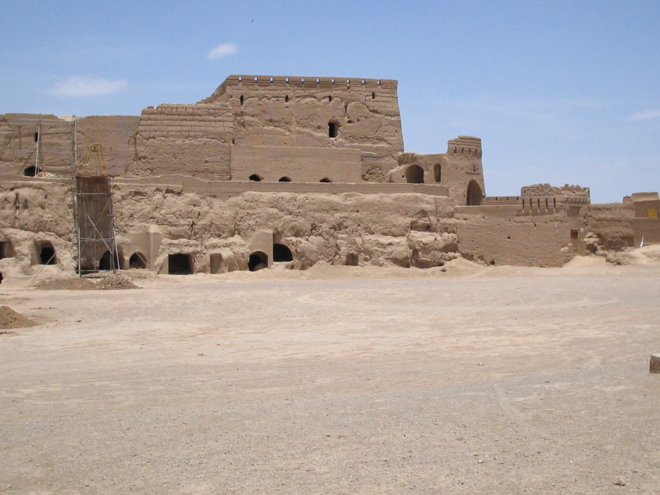 Meybod citadel, Iran.